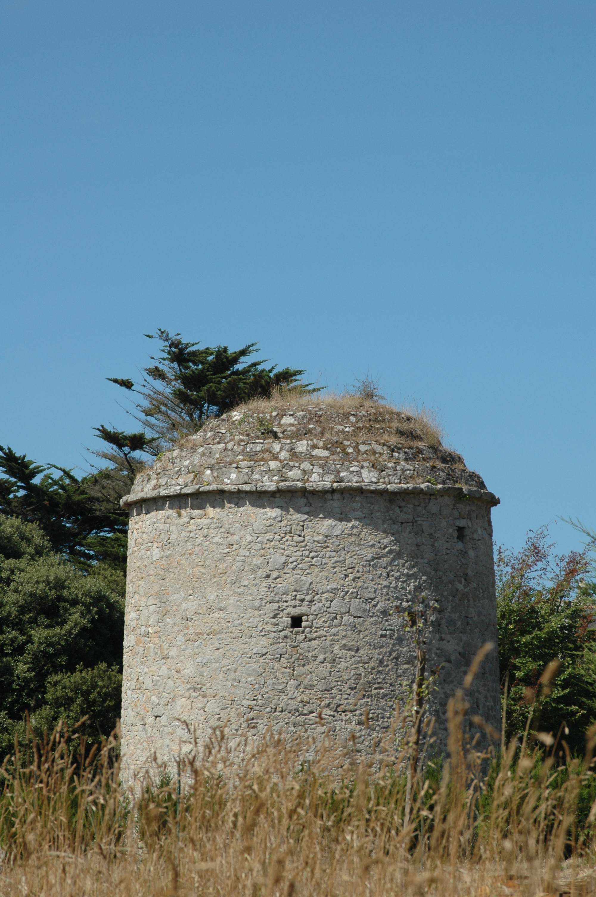 Batz-sur-Mer, pigeonnier ancien, près des citernes